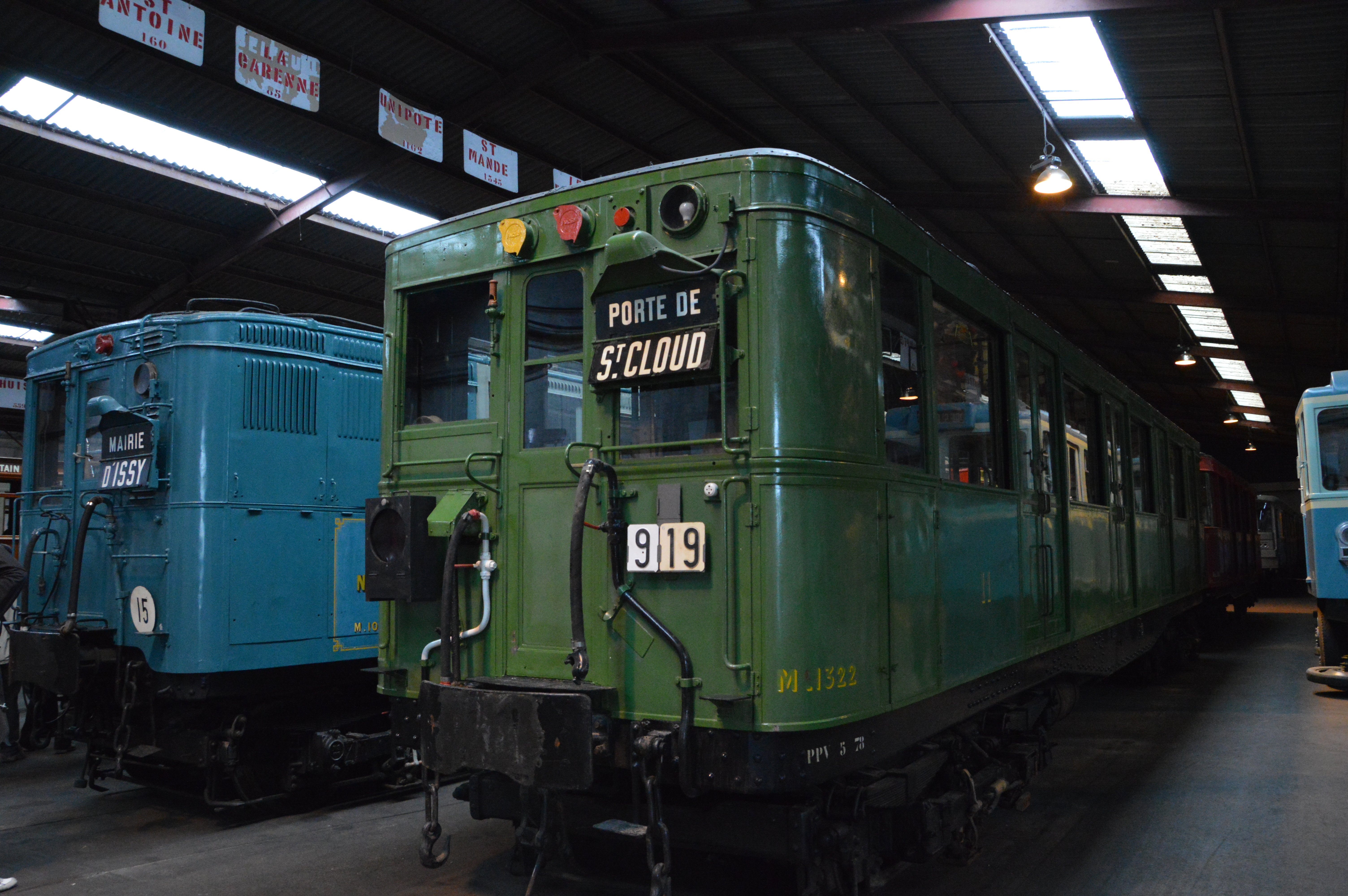 À gauche en bleu, une motrice de Sprague de la compagnie Nord-Sud. À droite en vert : une motrice Sprague de la CMP. (320R0071)